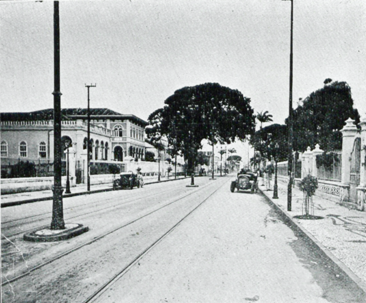 Vista do Corredor da Vitória, Salvador, Bahia, Brasil, em 1921.